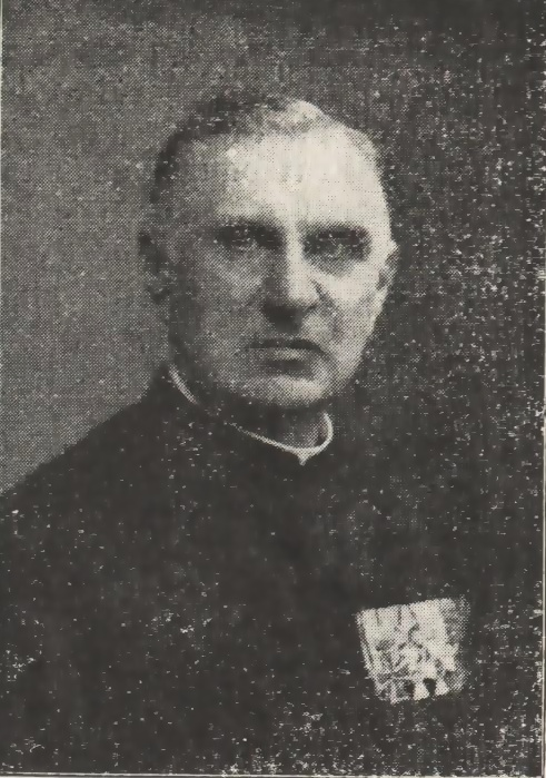 Bischof Heinrich Vollmar, Preußischer Feldpropst